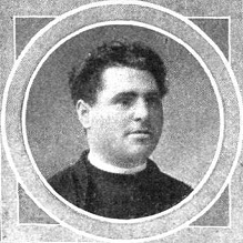 Banquete dado por la redacción de El Debate a su exdirector el sacerdote Basilio Álvarez por el éxito de su obra El libro del periodista.